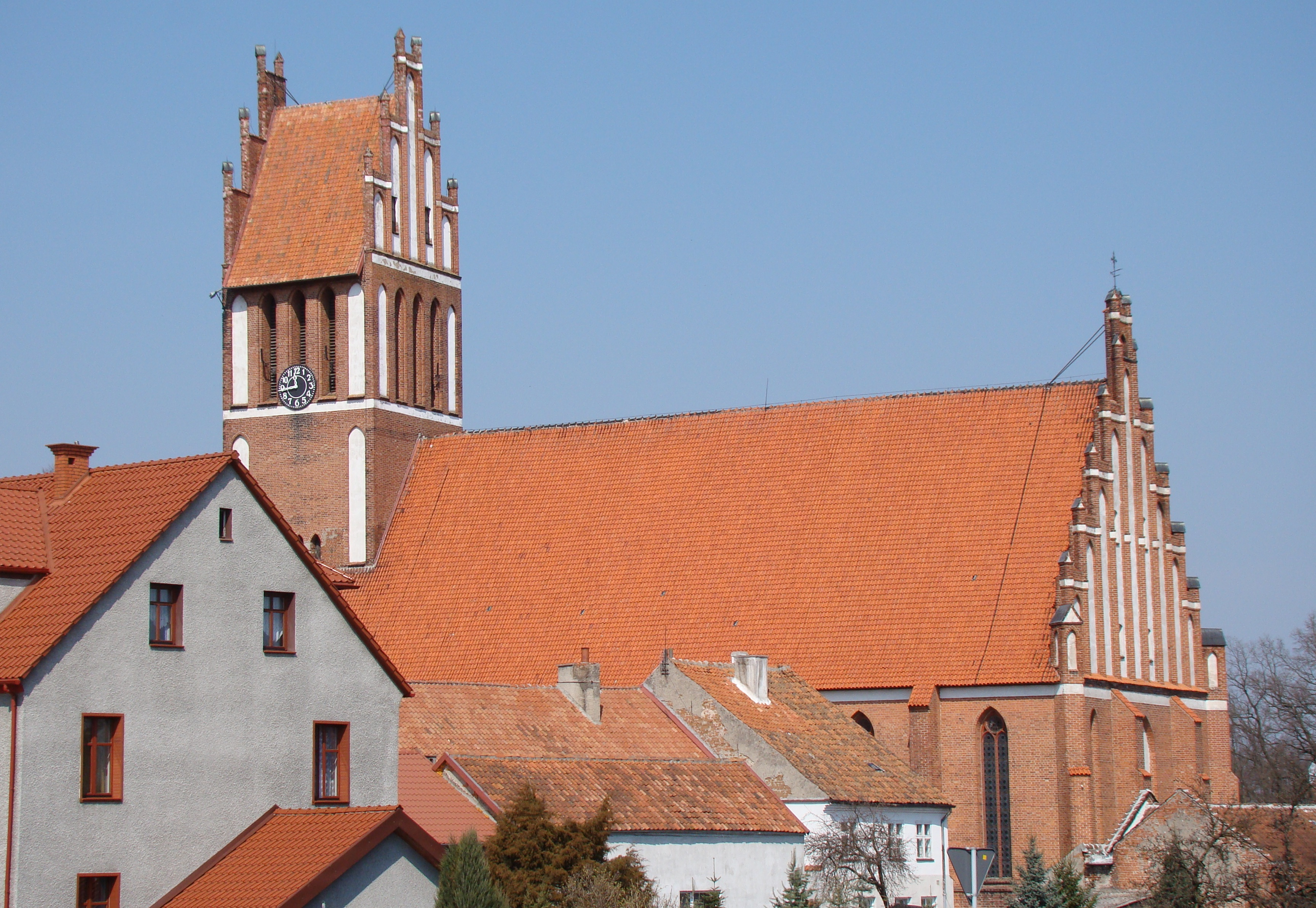 kościół parafialny p.w.św.Bartłomieja nr NID woj.warmińsko-mazurskie 247 (J/26) z 16.03.1957